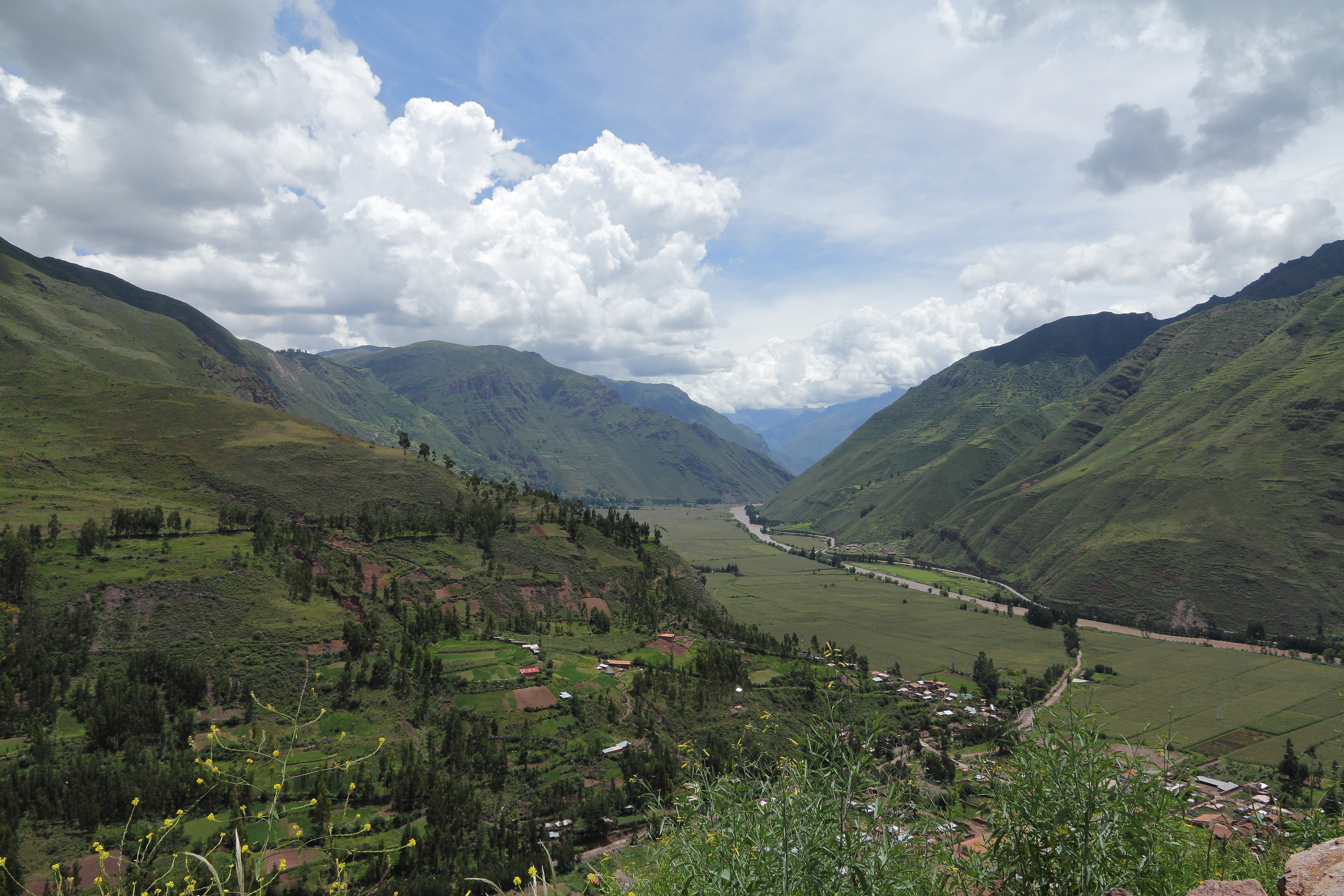 Urubambadalen, Cusco, Peru.